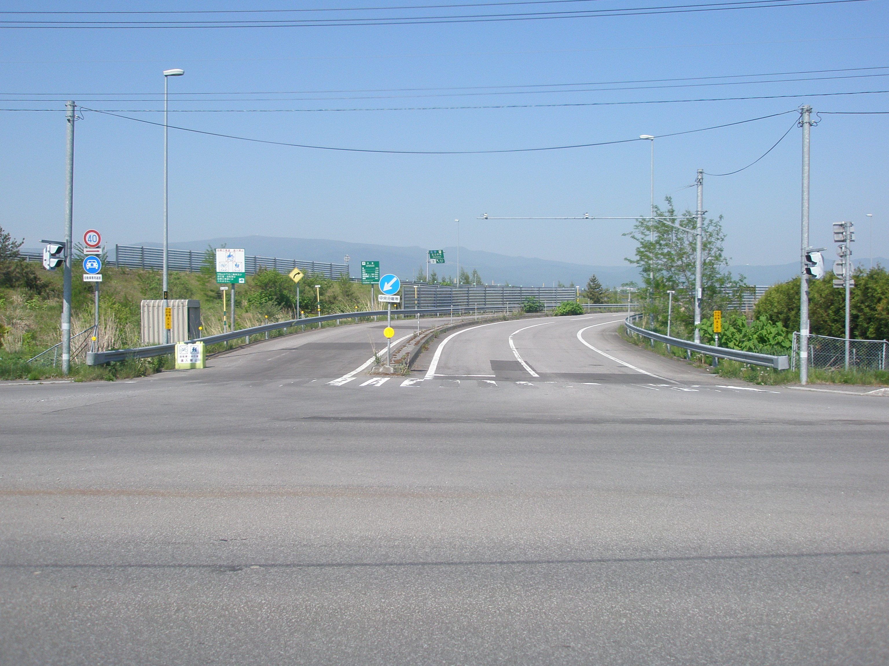 北斗中央インターチェンジ・入口（2019年5月撮影）